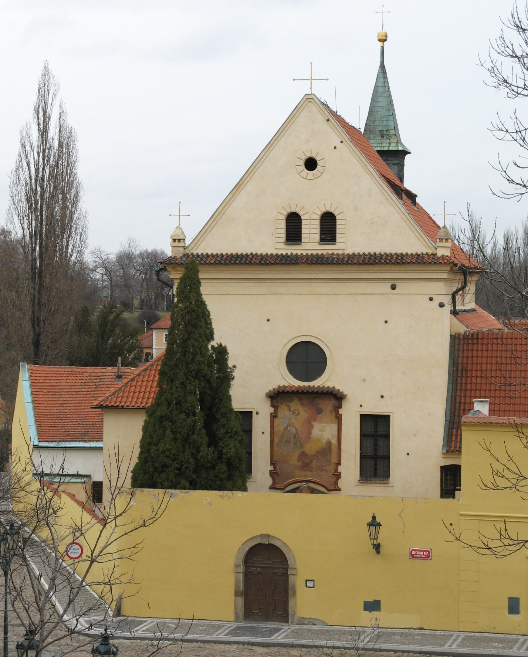 Kostel Panny Marie Andělské na Hradčanech, Loretánské náměstí. Základní kámen položen v roce 1600, vysvěcení kostela v roce 1602.